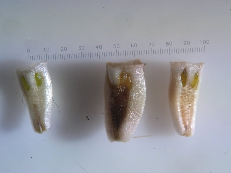 Echte Strandkamille (Tripleurospermum maritimum), Hiddensee, Früchte